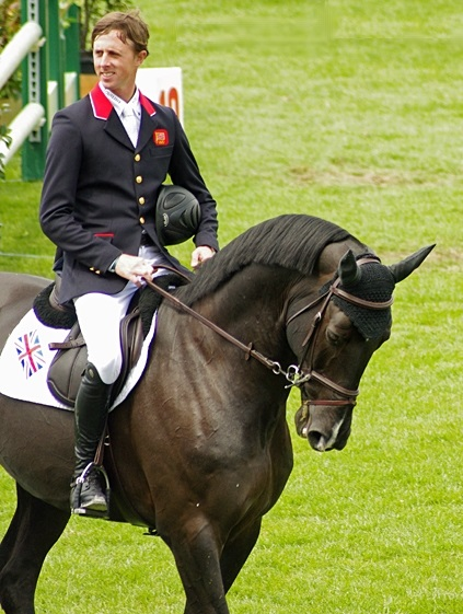 Ben Maher et Tripple X, lors de la parade de la Coupe des Nations de La Baule (17 mai 2013).